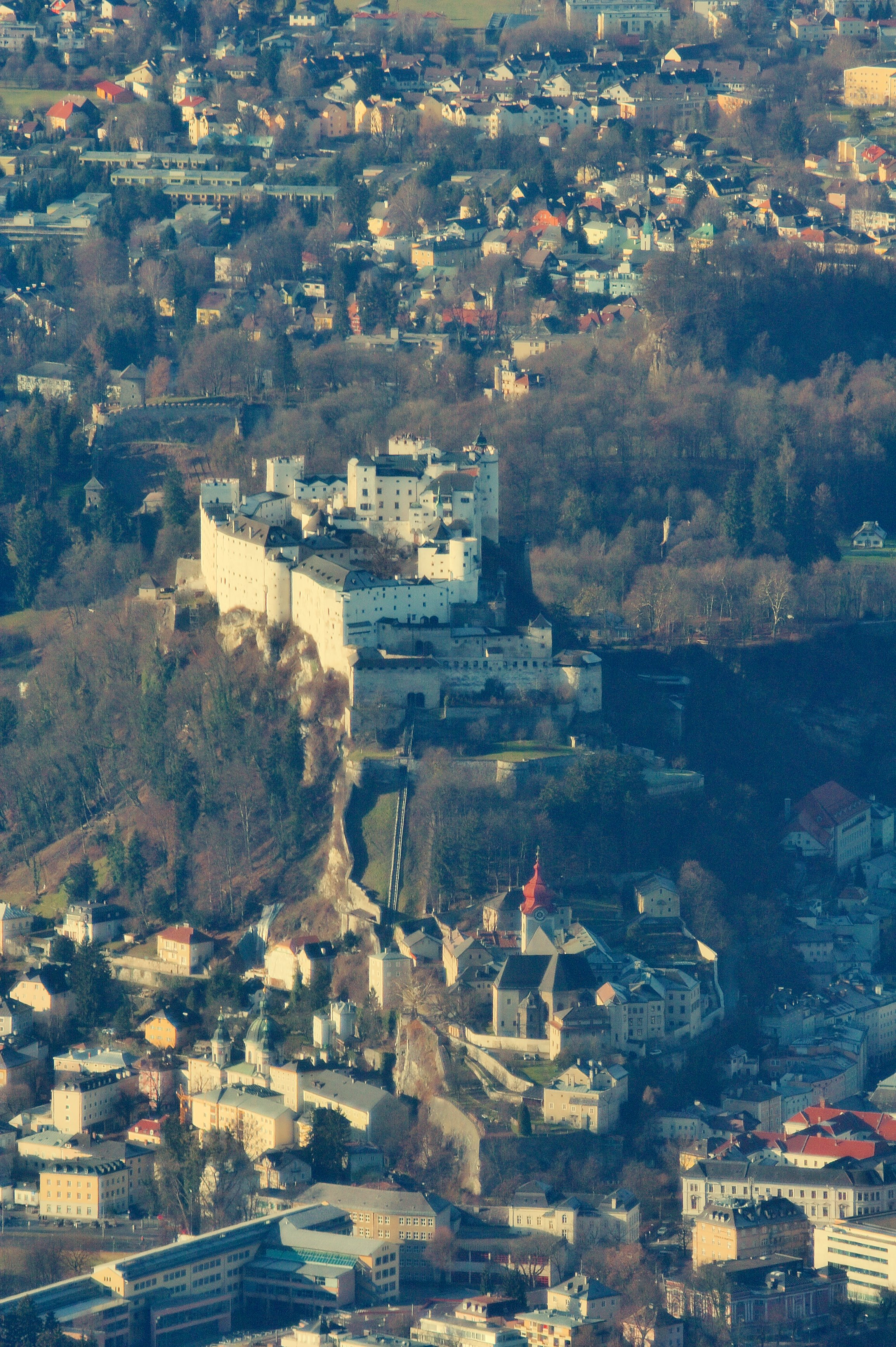 Festung Hohensalzburg vom Gaisberg aus